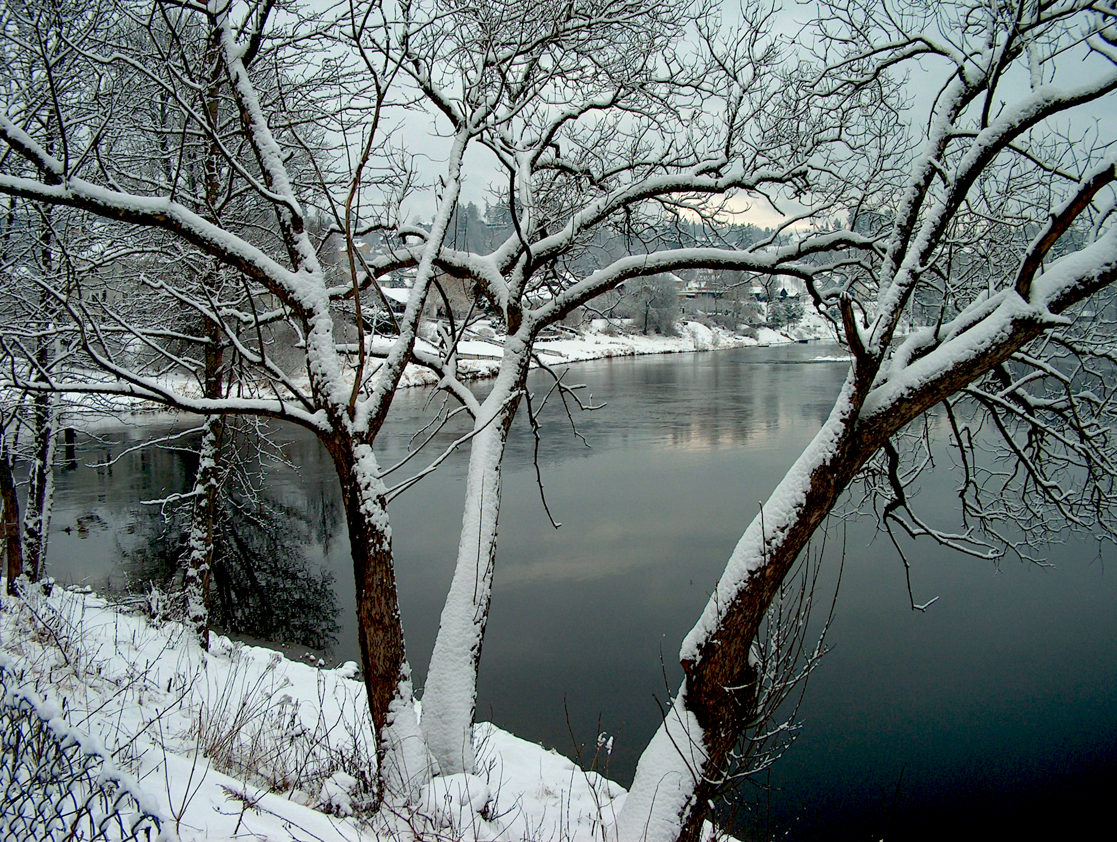 Dannelsen av Storelva